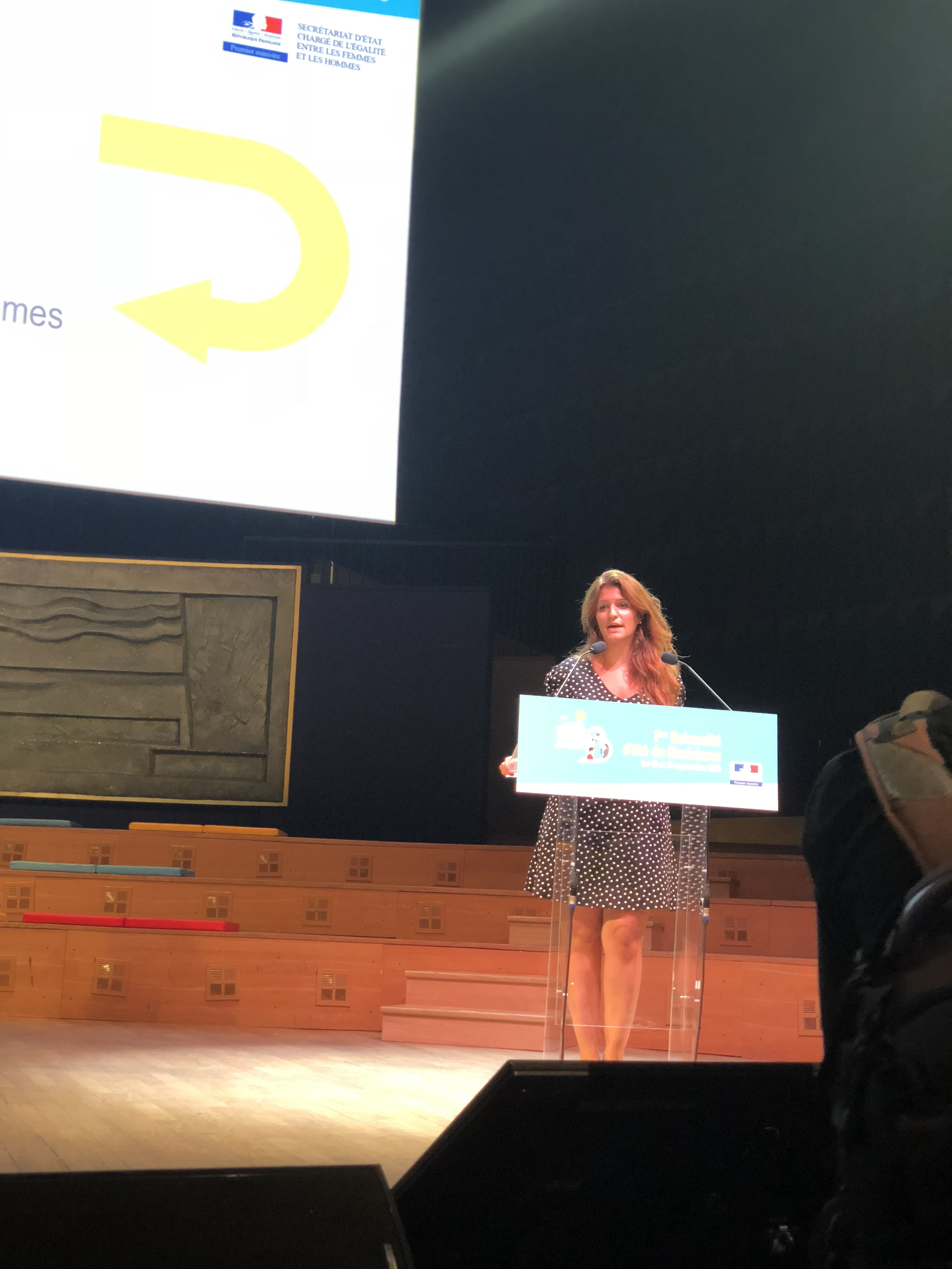 Discours de fermeture de Marlène Schiappa à Université d'été du Féminisme 2018 organisée par le secrétariat d'État à l'égalité entre hommes et femmes à Paris les 12 et 13 septembre 2018